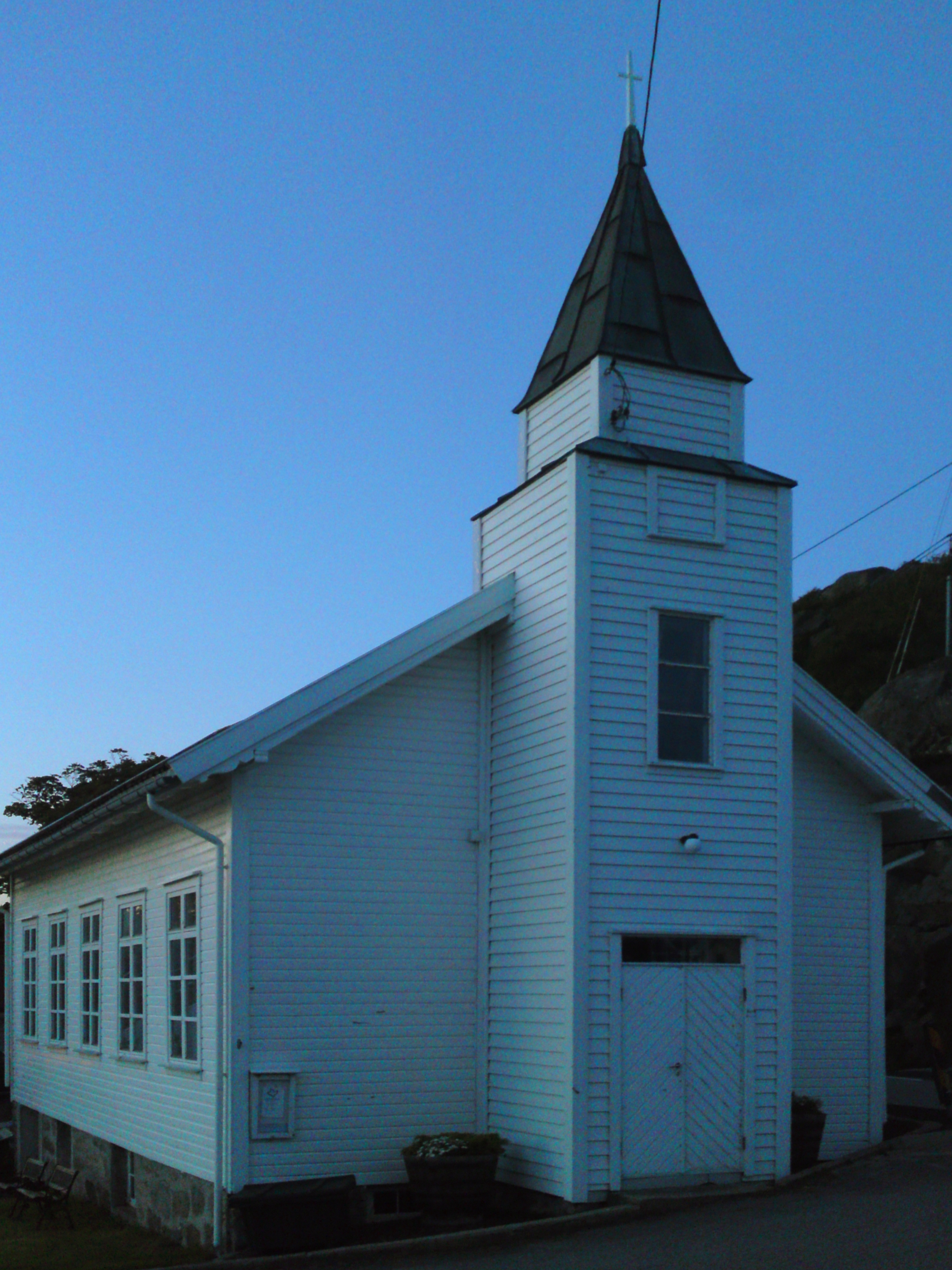 Korshamn kapell i Lyngdal